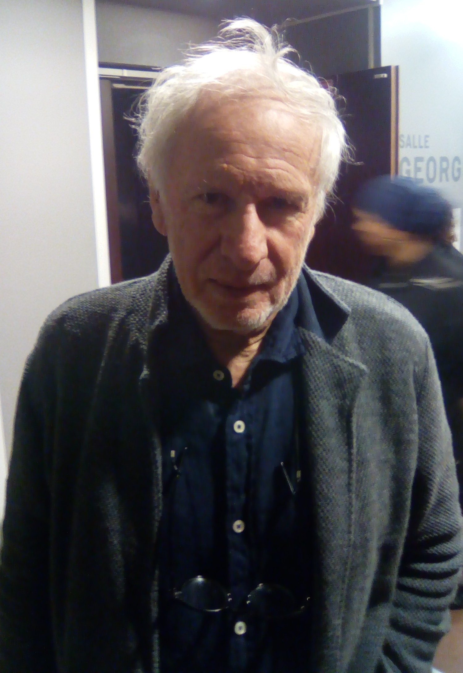 Jean-François Laguionie à la projection de son film "L'Île de Black Mór" à la cinémathèque française.